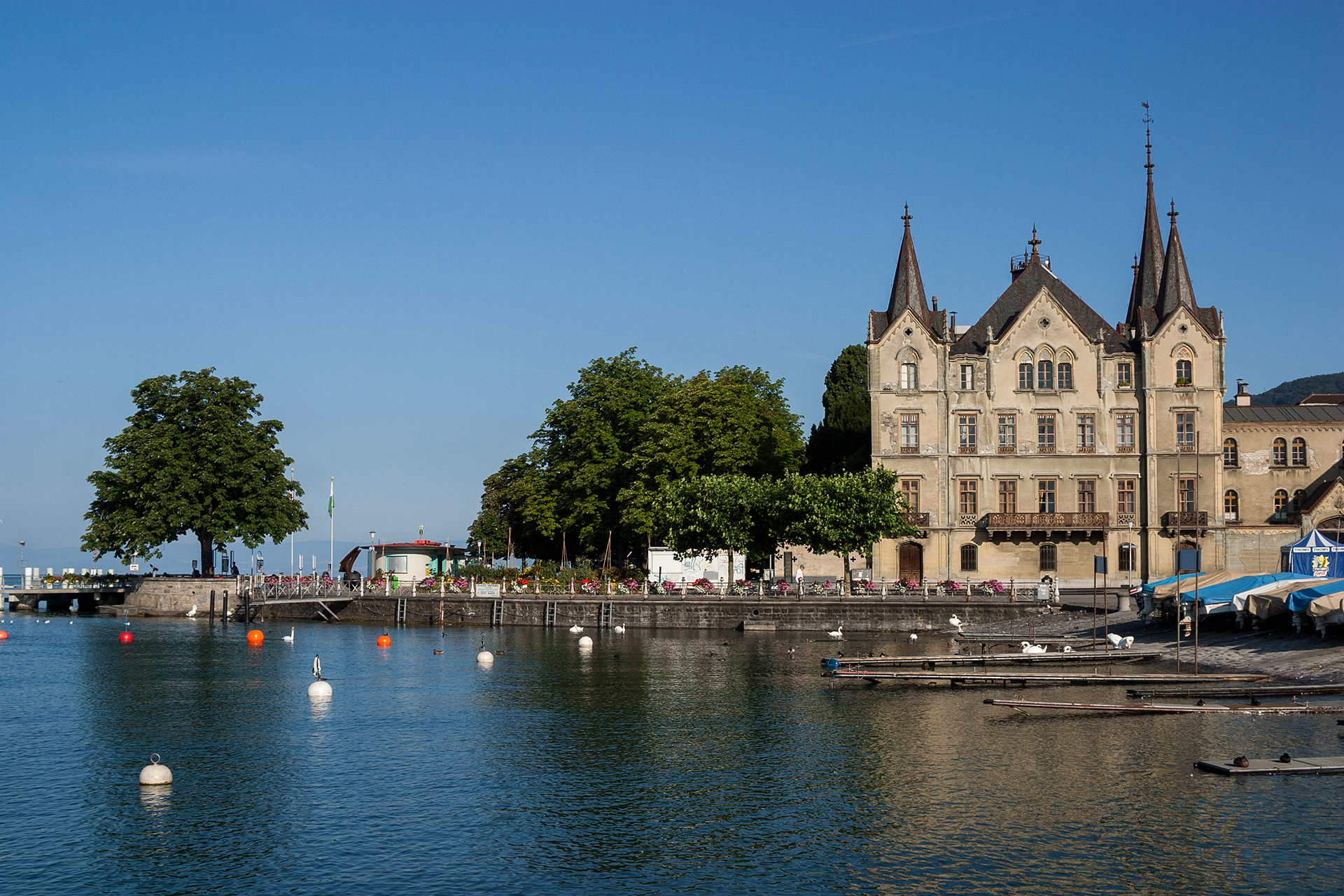 Schloss in Vevey